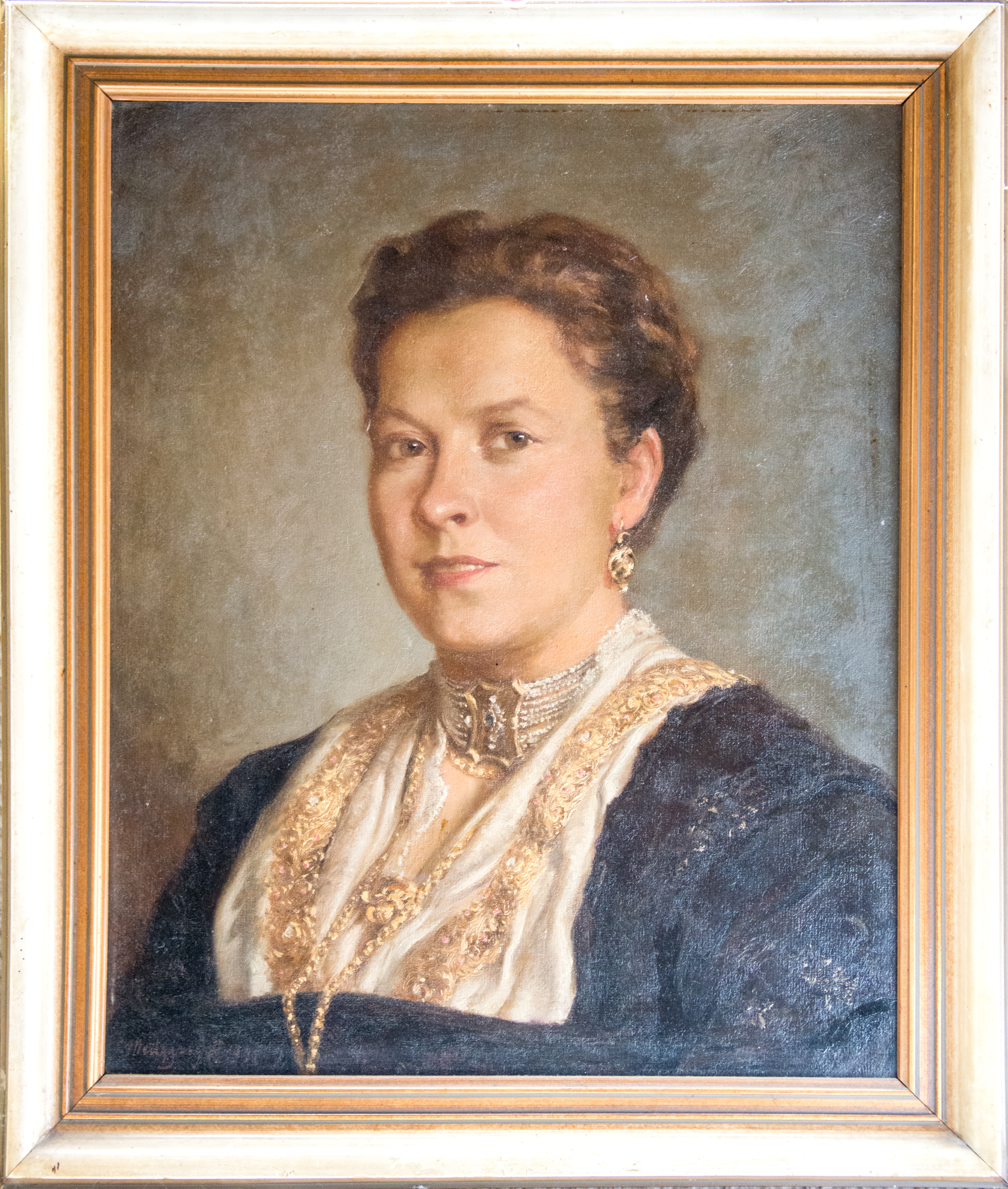 Anna Hauser, Wirtin beim Stangl in Going am Wilden Kaiser, Portrait von Peter Thaler